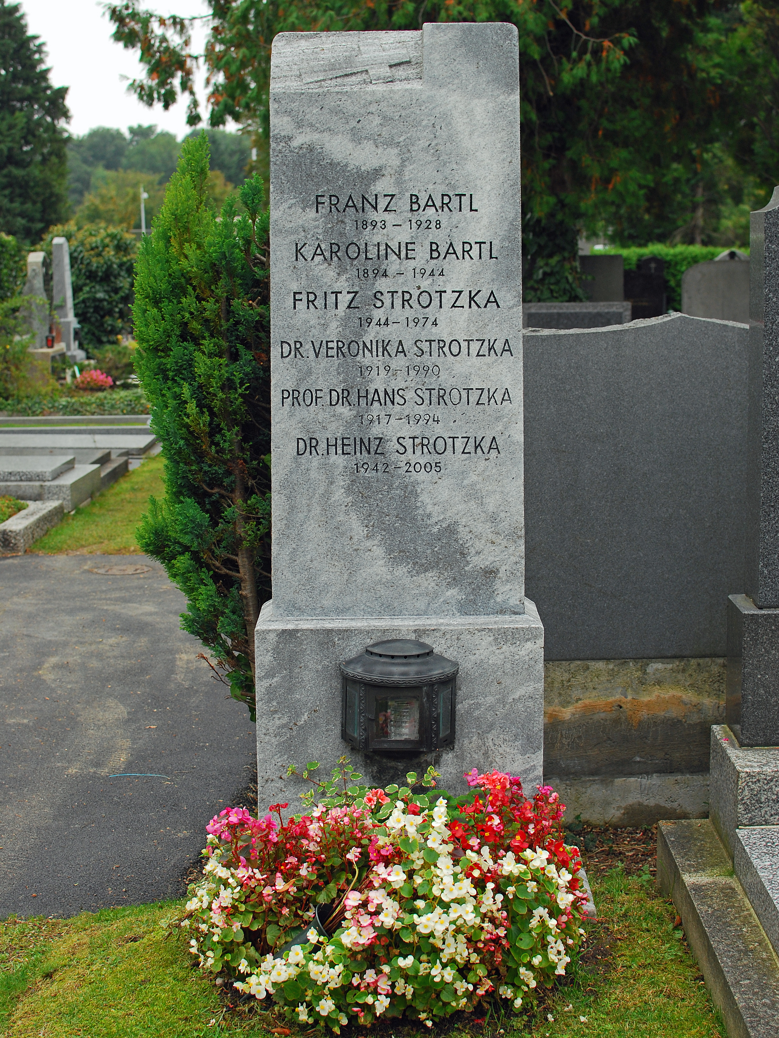 Grab Hans Strotzka, Tiefenpsychologe, FH. Hietzing